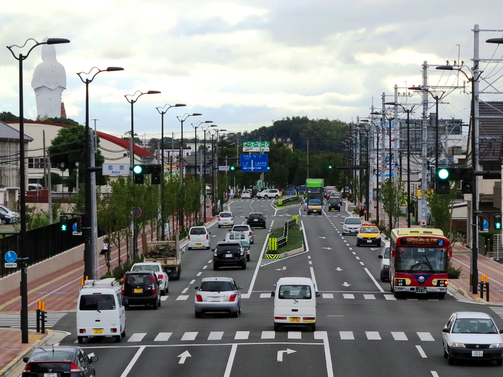 自衛隊久留米駐屯地の前を走行する堀川バス